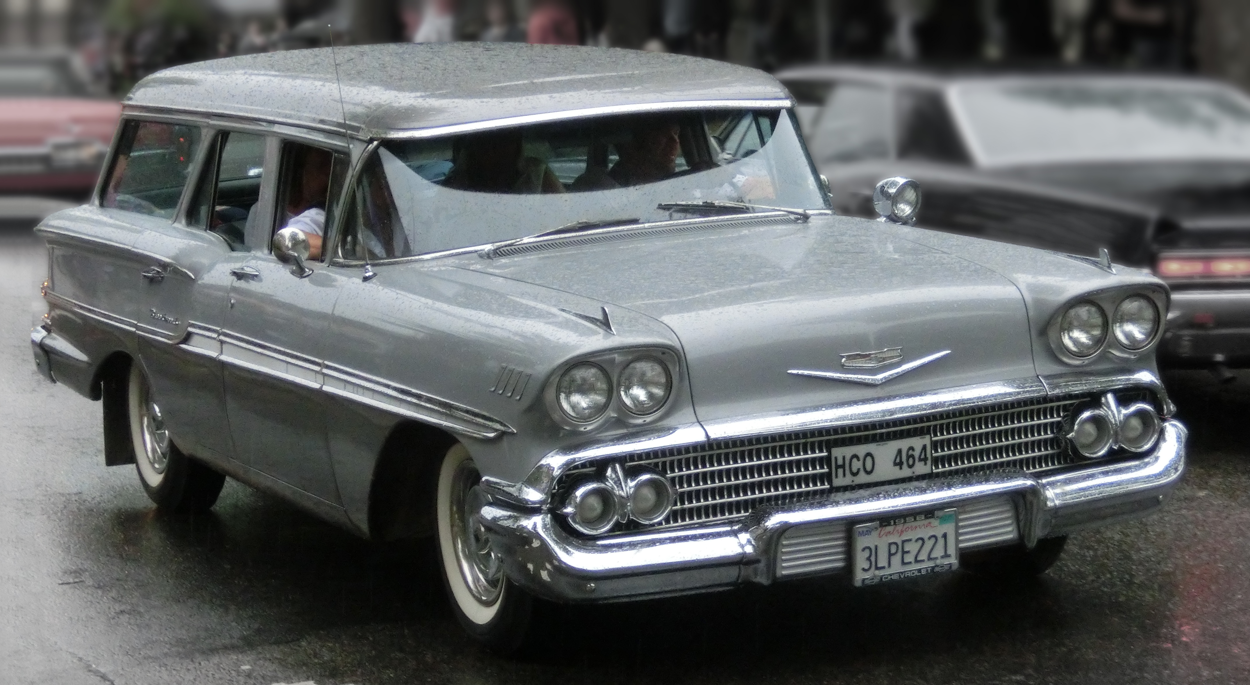 En grå Chevrolet Brookwood HGV av årsmodell 1958 på cruising i Falköping 2014-07-26. Bilen kör på "Ströget" (Sankt Olofsgatan) i Falköping, Västergötland, Västra Götalands län, Sverige.